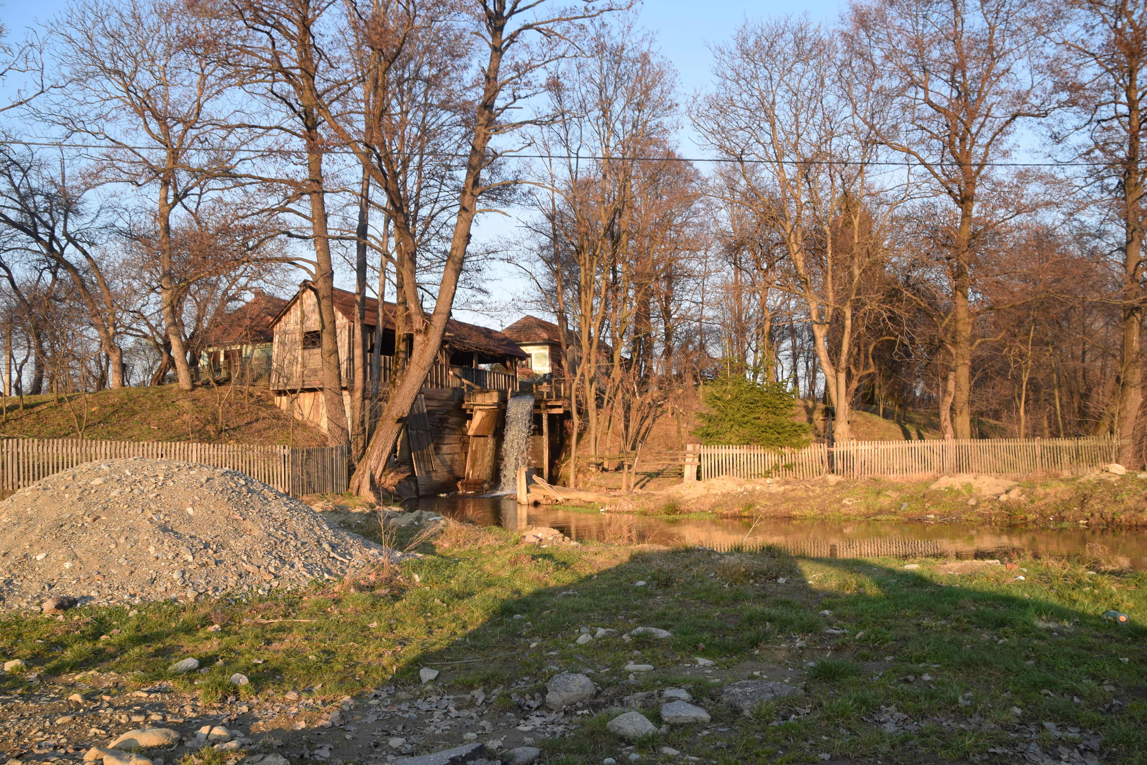 Muzeu etnografic sătesc